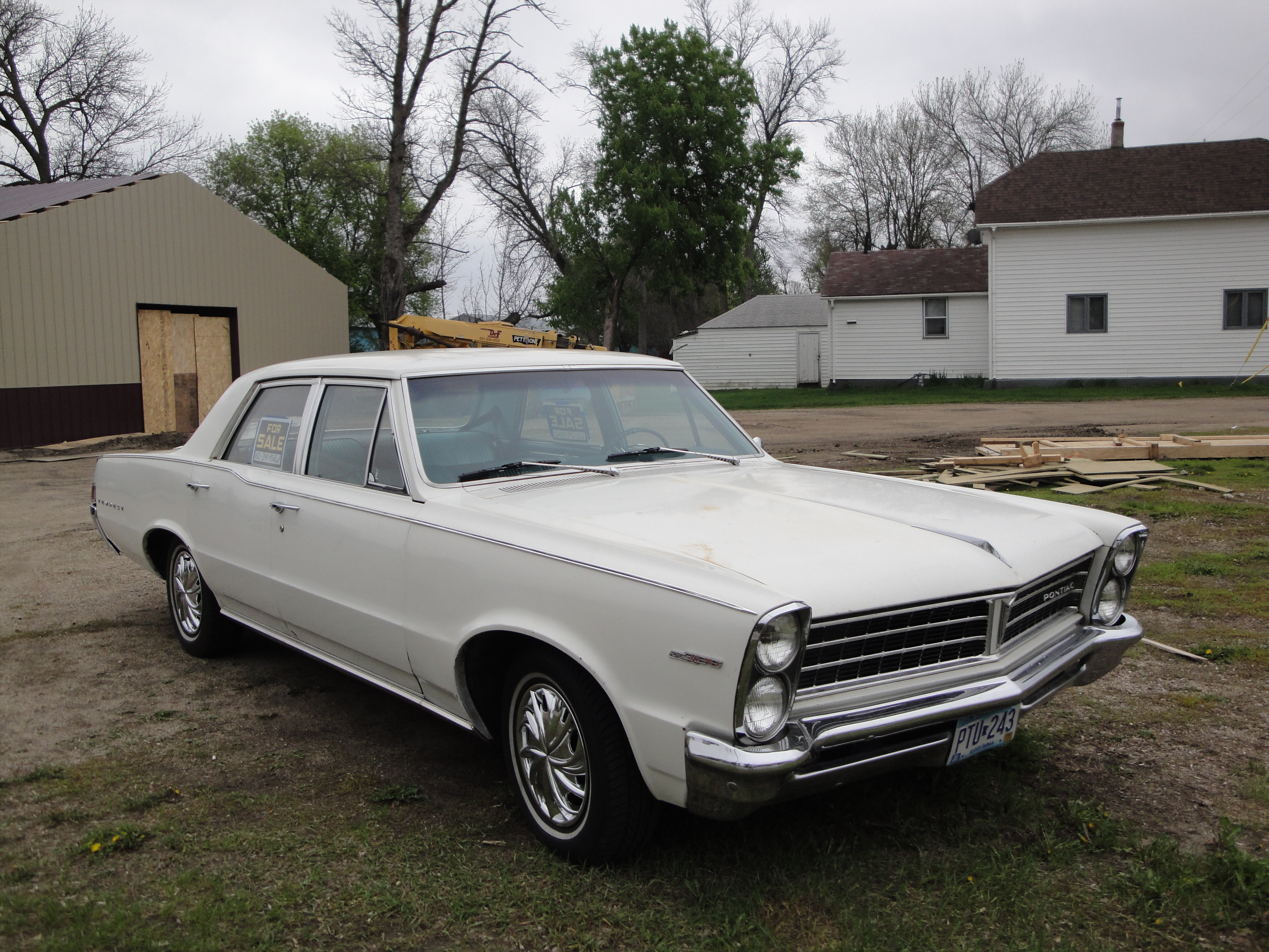 65 Pontiac Tempest Custom